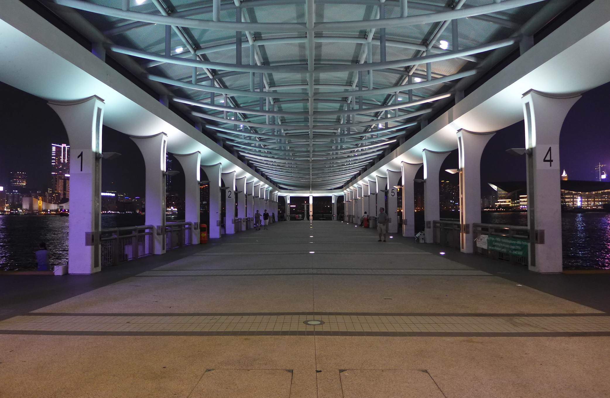 Pier 10 Night view